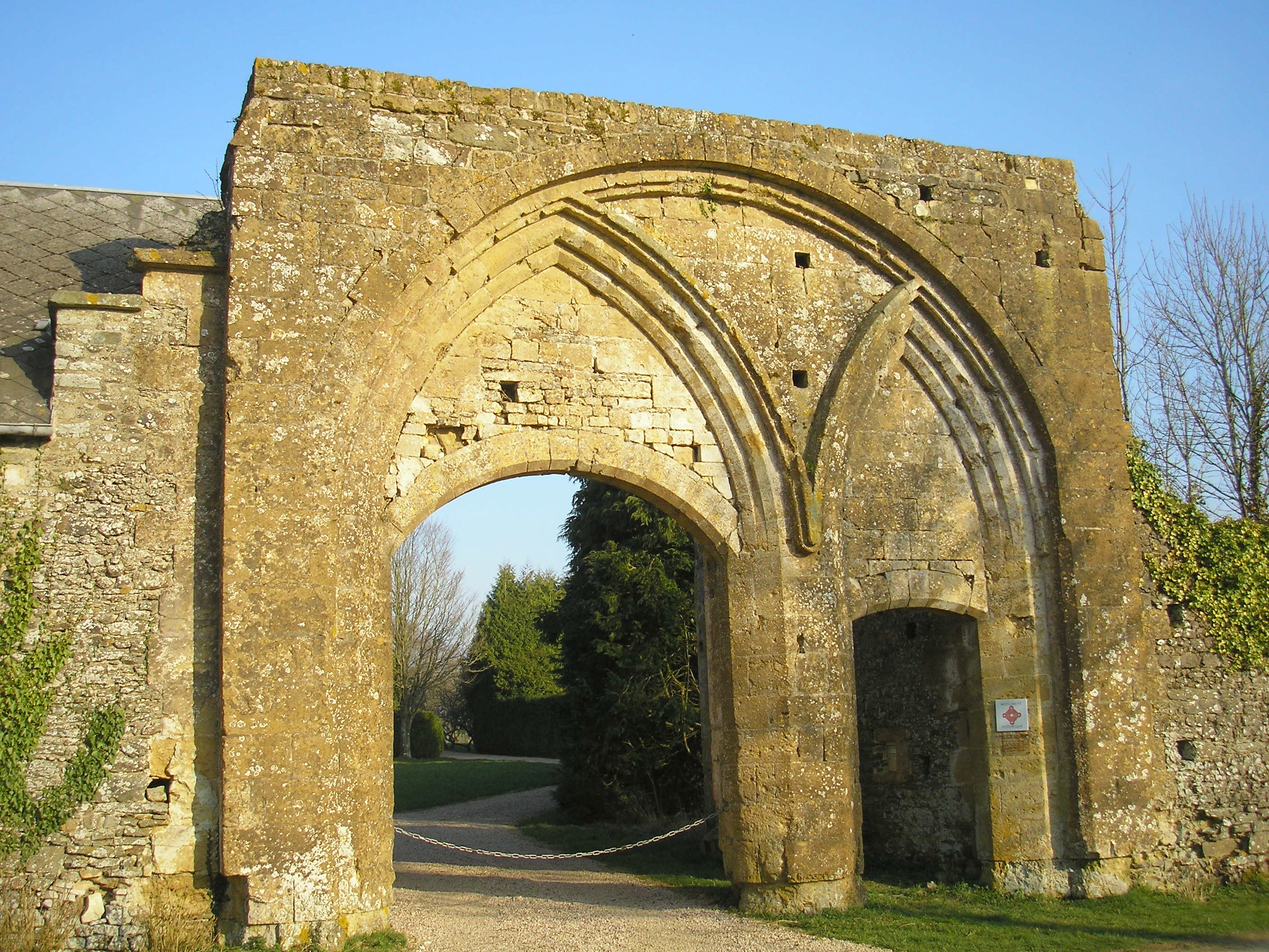 Le Plessis-Grimoult (Normandie, France). Entrée du prieuré.